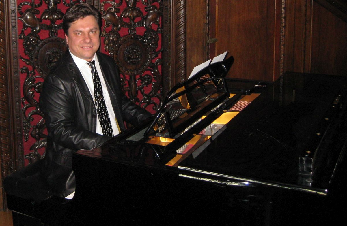 am Kozertflügel